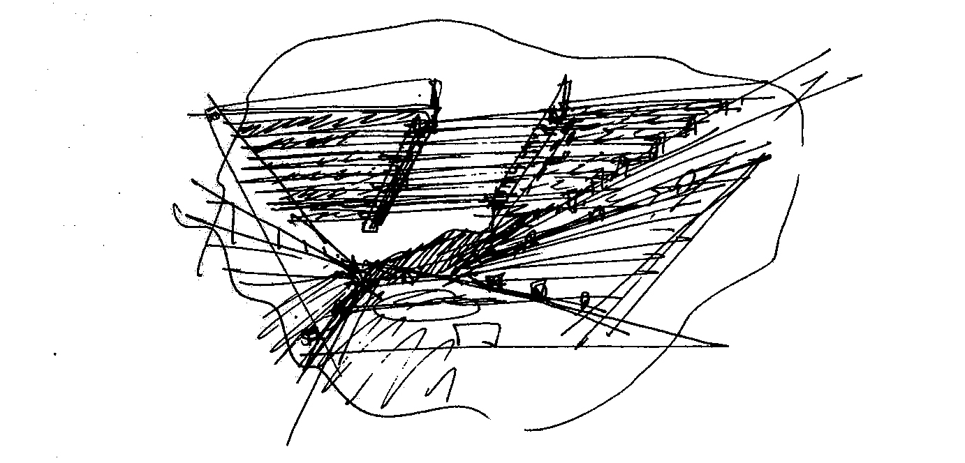 Eduardo Souto de Moura - Braga Stadium Drawings 01 - Sketch.jpg